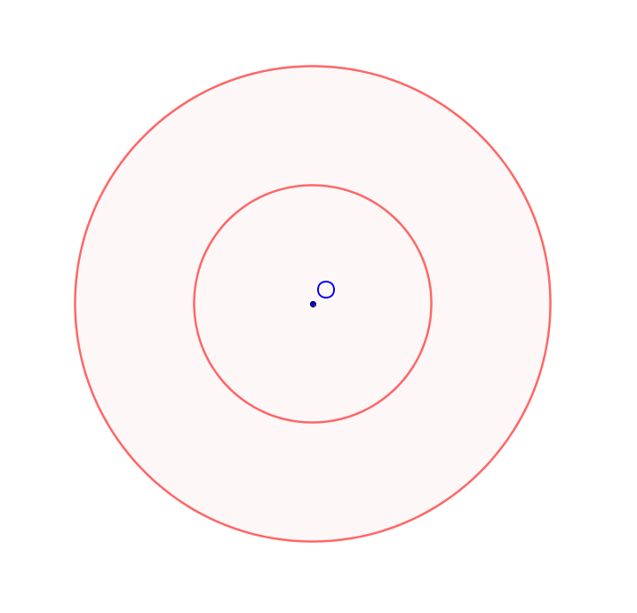 файл выполнен в среде GeoGebra